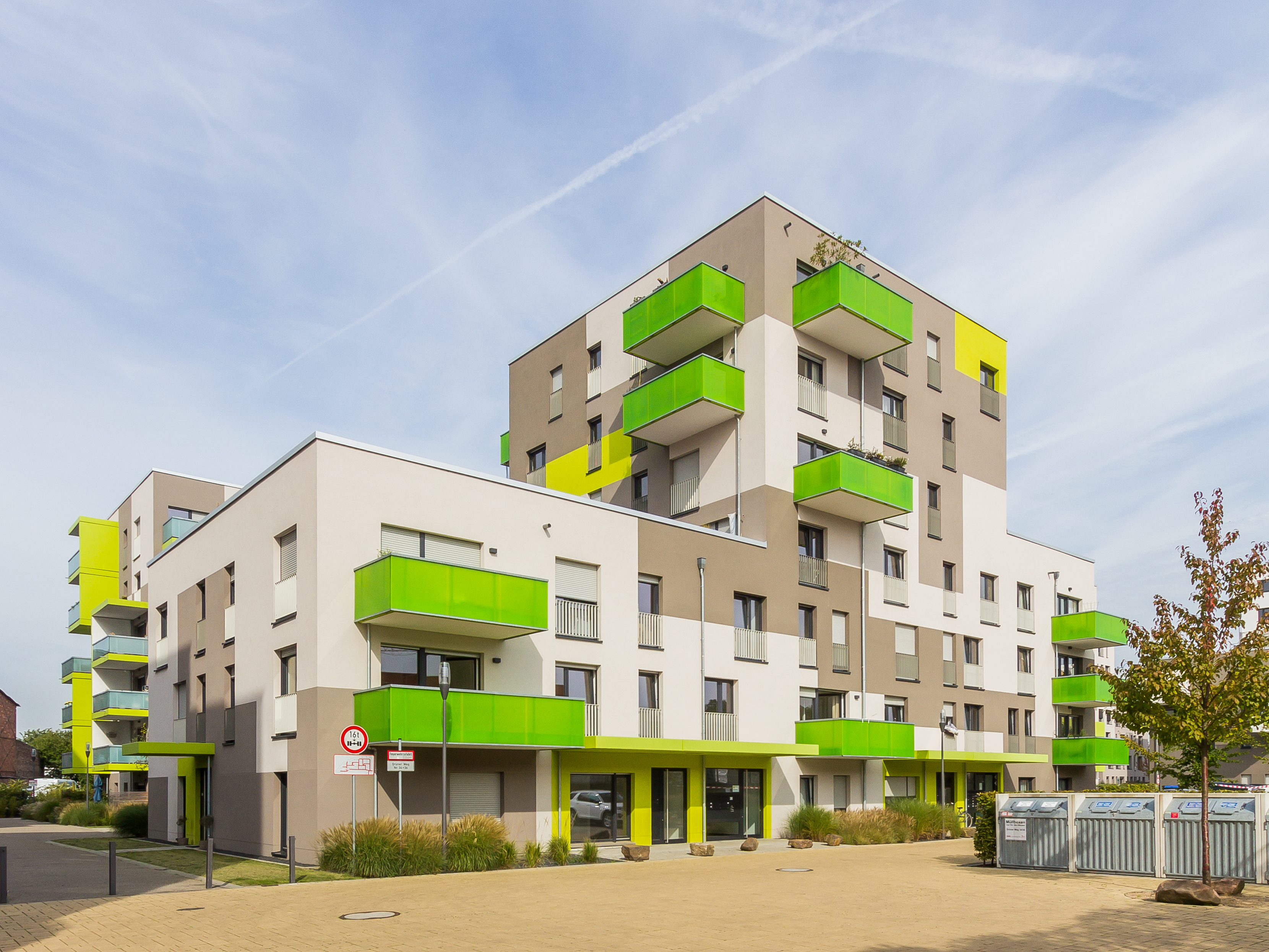 GAG-Siedlung Grüner Weg, Köln-Ehrenfeld. Neubaugebiet westlich